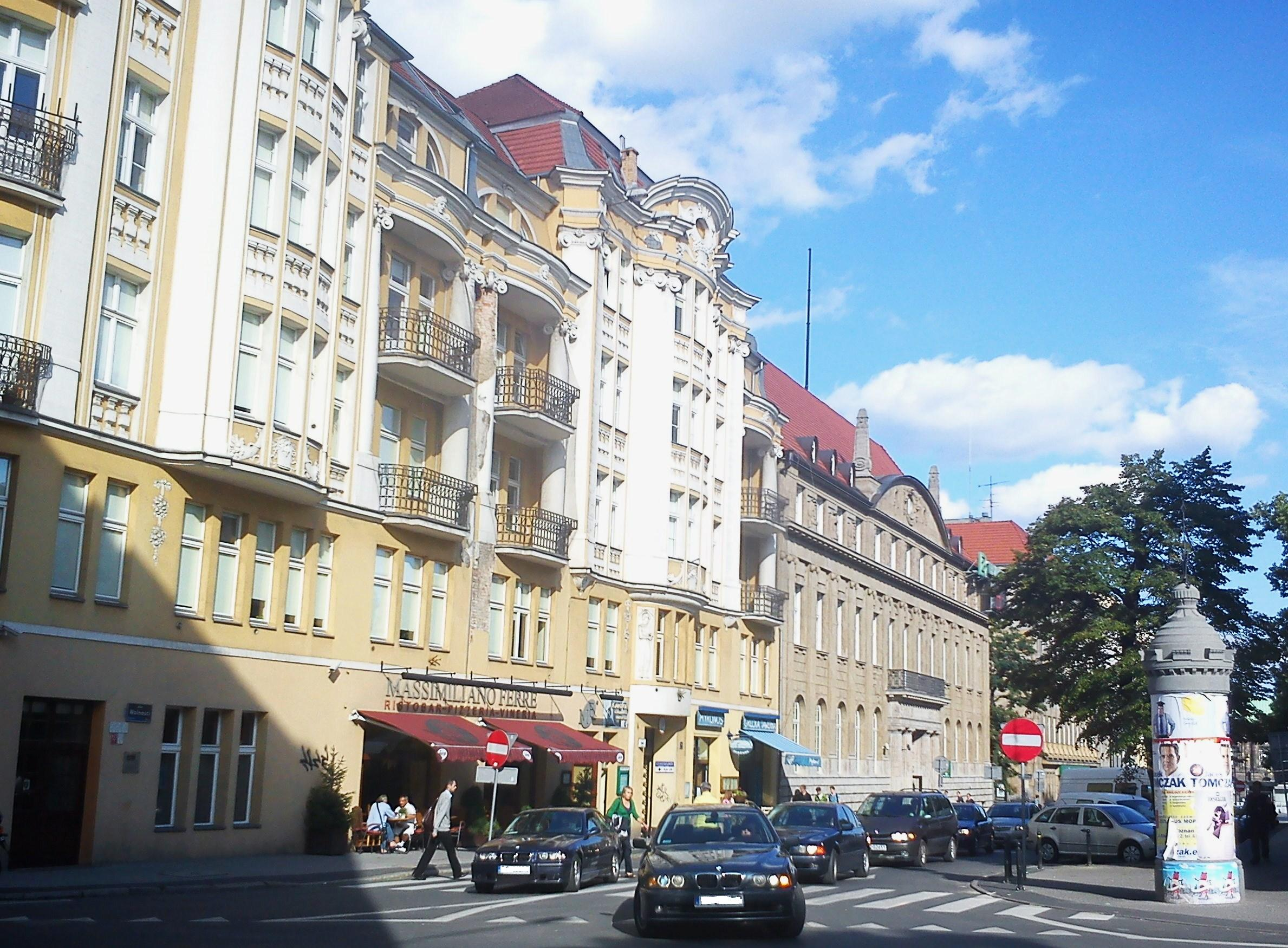 Poznań, Plac Wolności 14 / róg ul. 3 Maja 46 - neobarokowy gmach Towarzystwa Union projektu Rogera Sławskiego, 1910 (zabytek nr A 418)